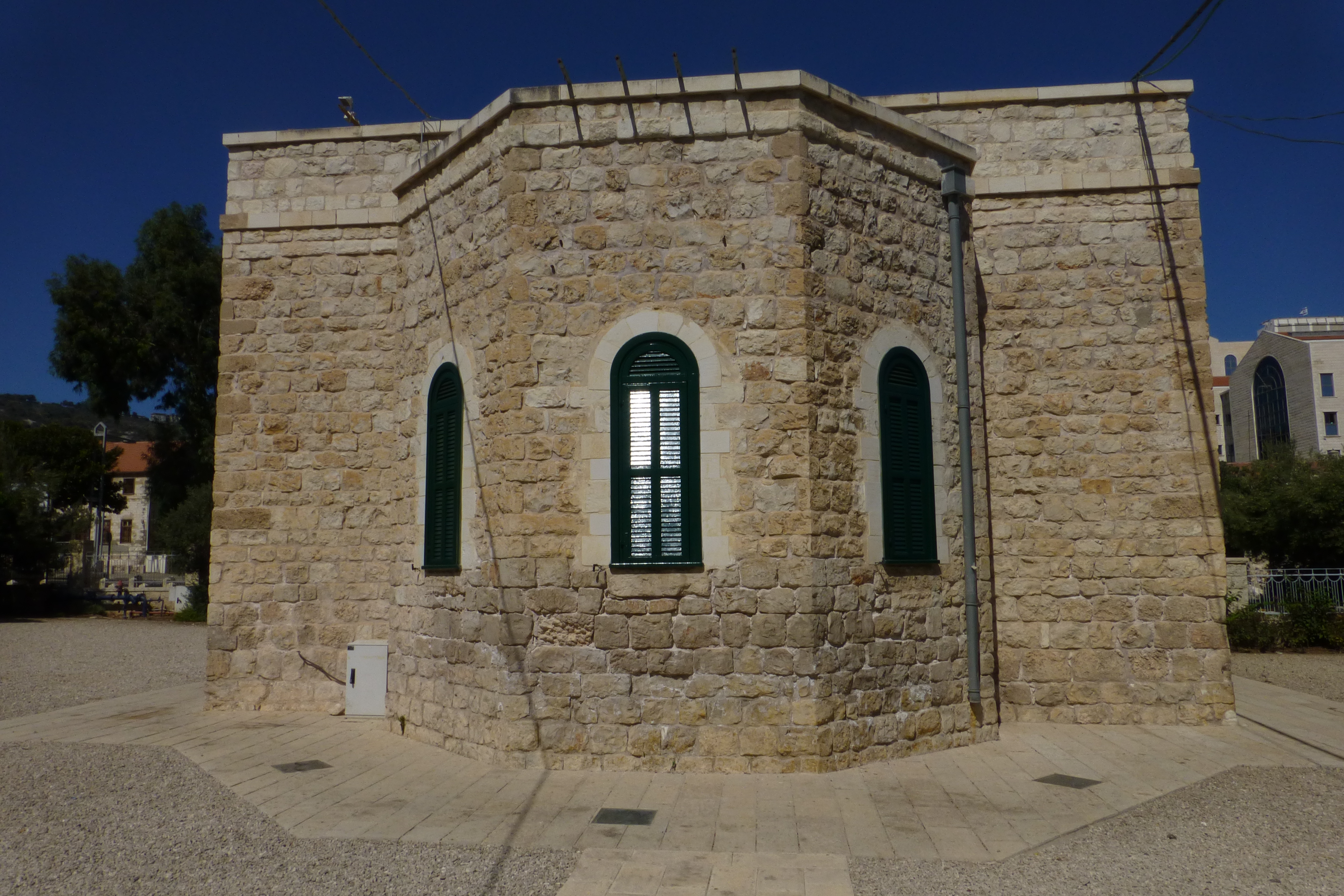 מוזיאון העיר הוא מוזיאון העוסק בתרבות אורבנית ובתיעוד ובהצגת ההיסטוריה של העיר חיפה, . המוזיאון נפתח בנובמבר 2000, והוא ממוקם במבני בית העם הטמפלרי ובית הספר הטמפלרי. המוזיאון הוא חלק ממוזיאוני חיפה. בית העם הטמפלרי הוקם בשנת 1869 והיה הבניין הראשון שהקימו הטמפלרים בארץ.